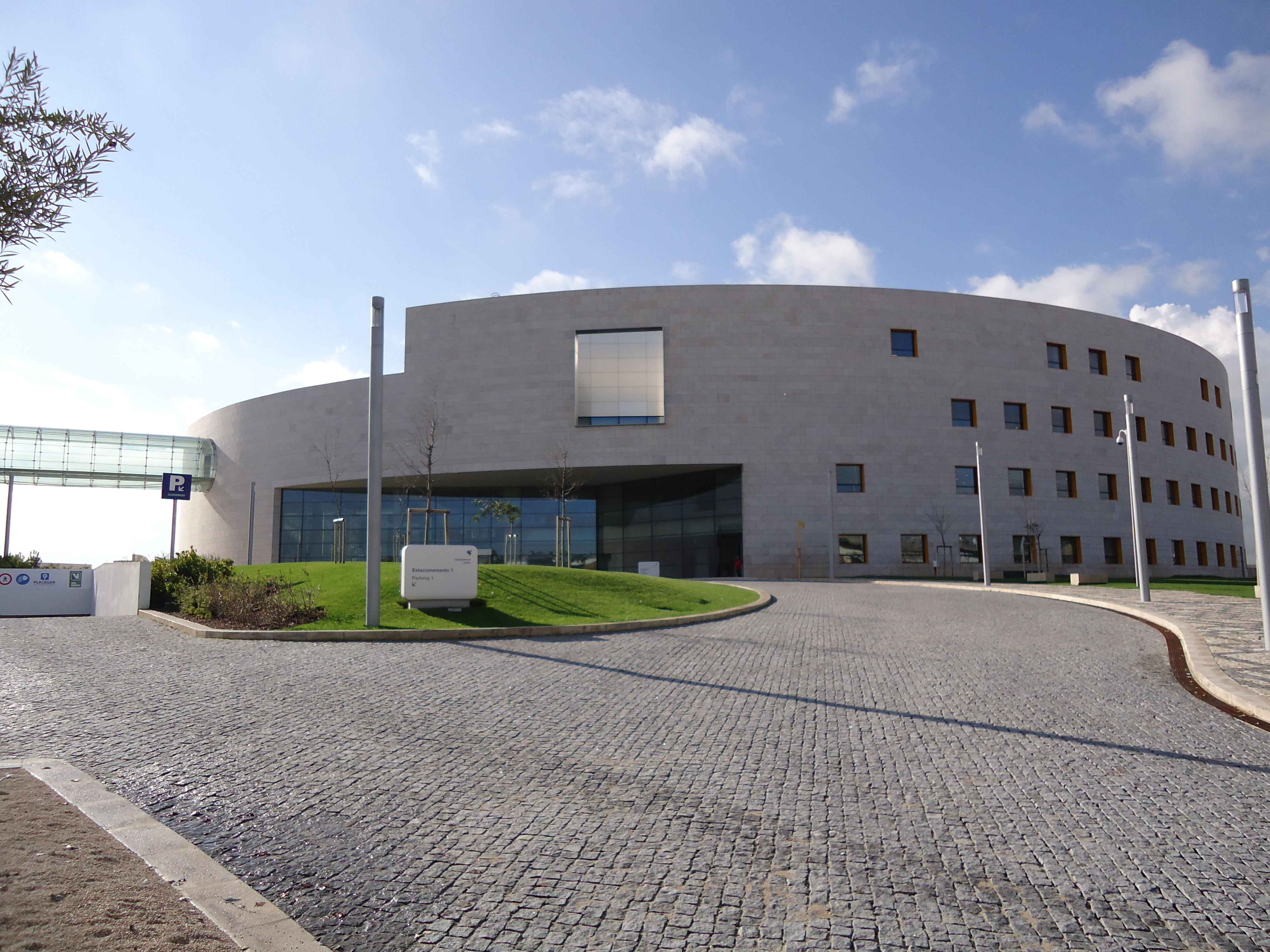 Champalimaud Centre for the Unknown, Lisboa, Portugal: edifício principal.